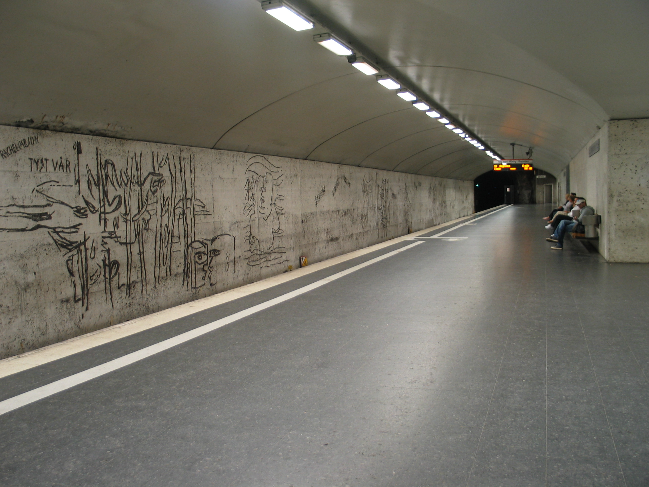 Östermalmstorg, a metro station in Stockholm, Sweden.